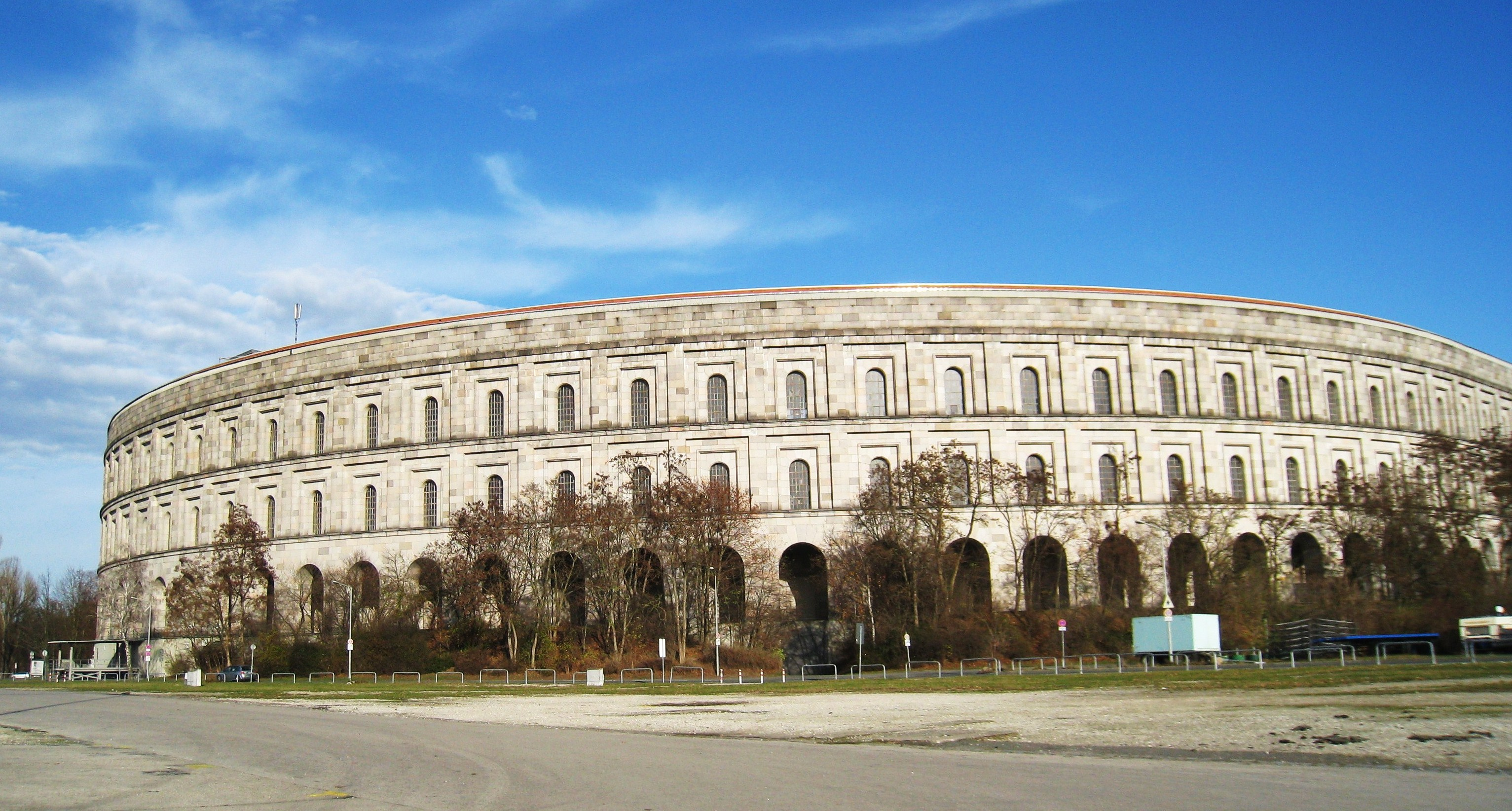 Kongresshalle Nürnberg